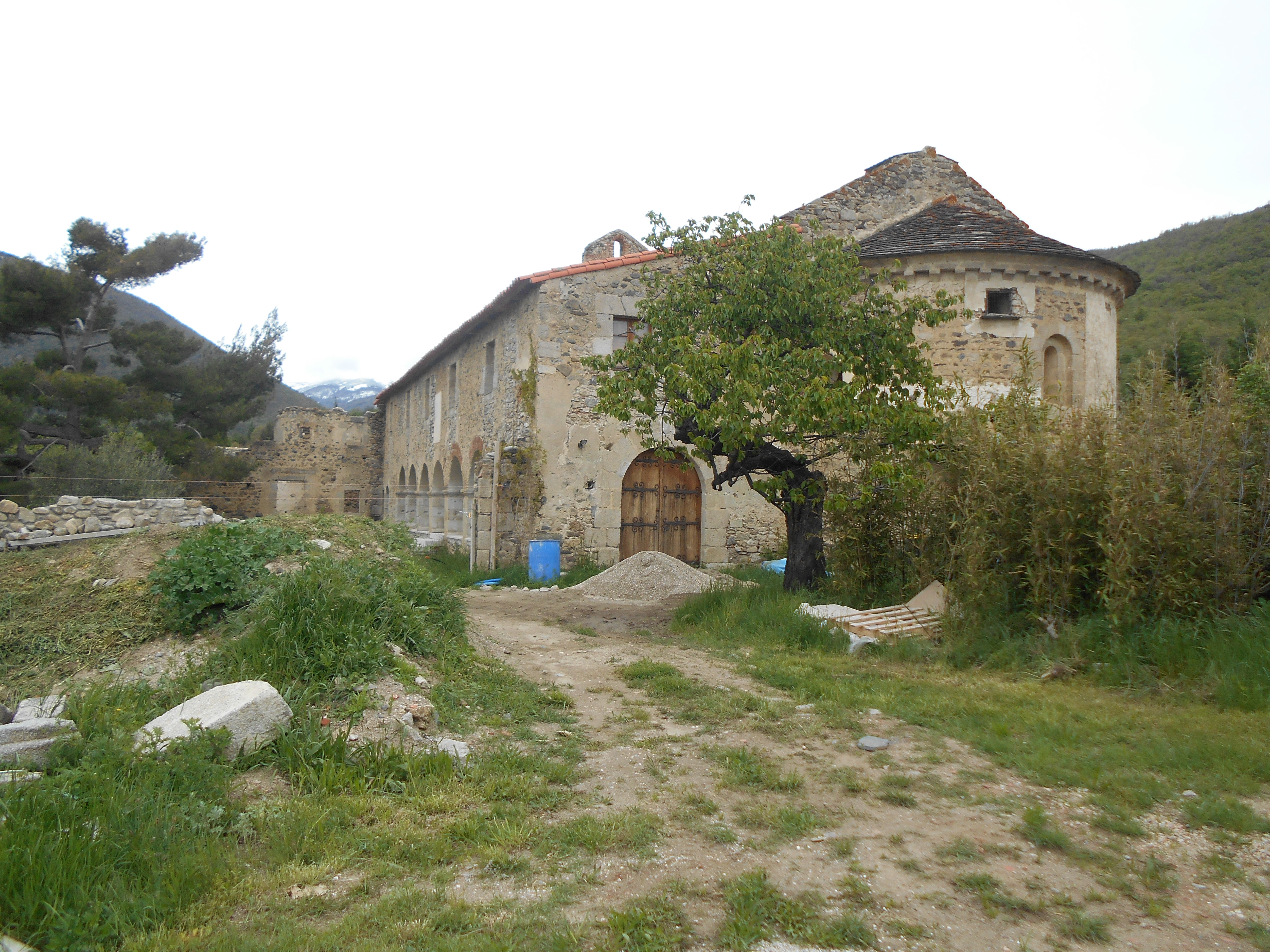 Santa Maria de Corbiac, a Mosset. Absis i costat sud